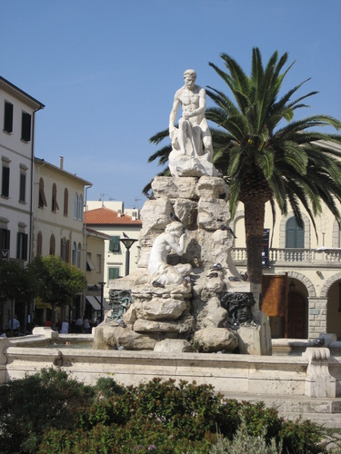 Fontana di Cecina in Piazza Guerrazzi Cecina_(LI)